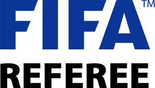 Insignia FIFA árbitros 2019